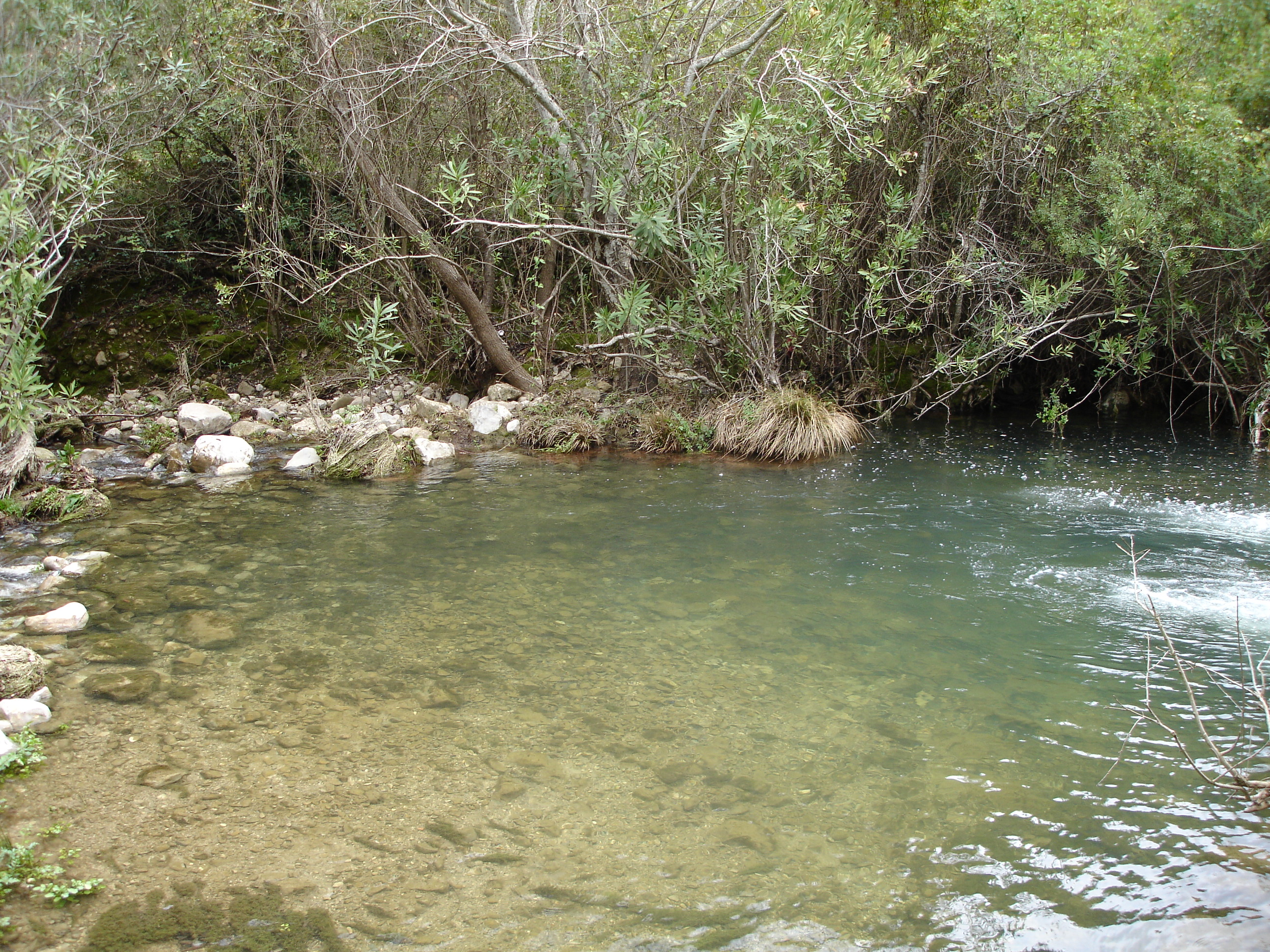 Río Tavizna, Ubrique (Spain)